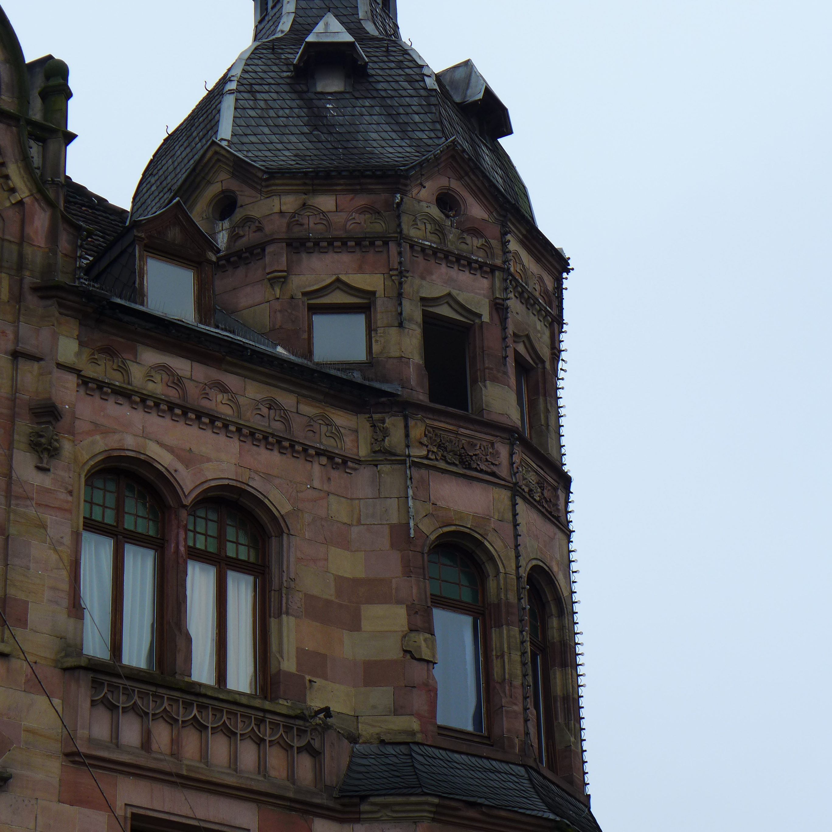 Saarbrücken-St. Johann, Erkerturm Ecke Betzenstraße/Stephanstraße/Großherzog-Friedrich-Straße, Reste der Glühbirnenleisten von der Angliederungsfeier des Saargebietes an das Deutsche Reich am 1. März 1935